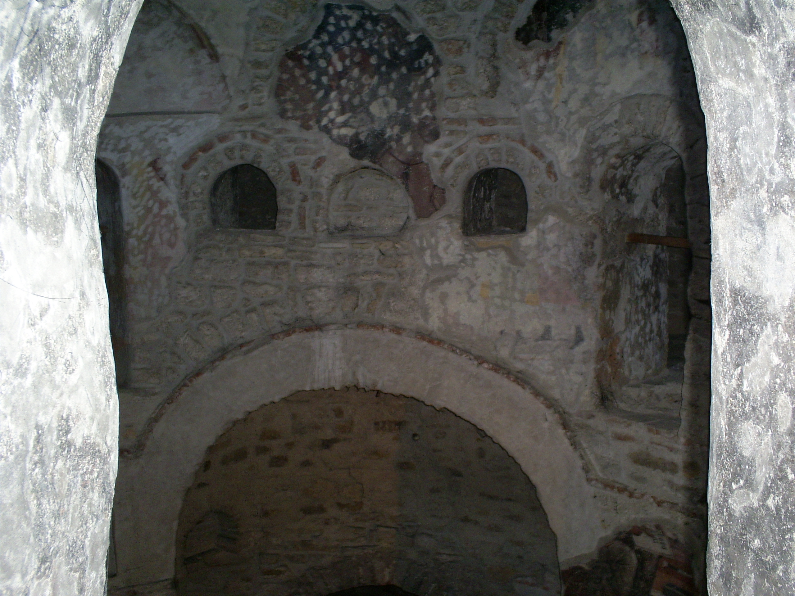 Petrova crkva, pogled sa "galerije" na drugu stranu